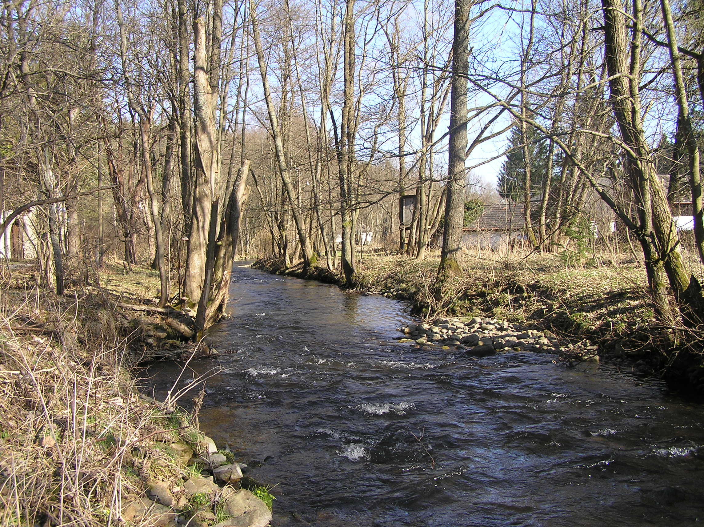 Řeka Spůlka u Čábuzí